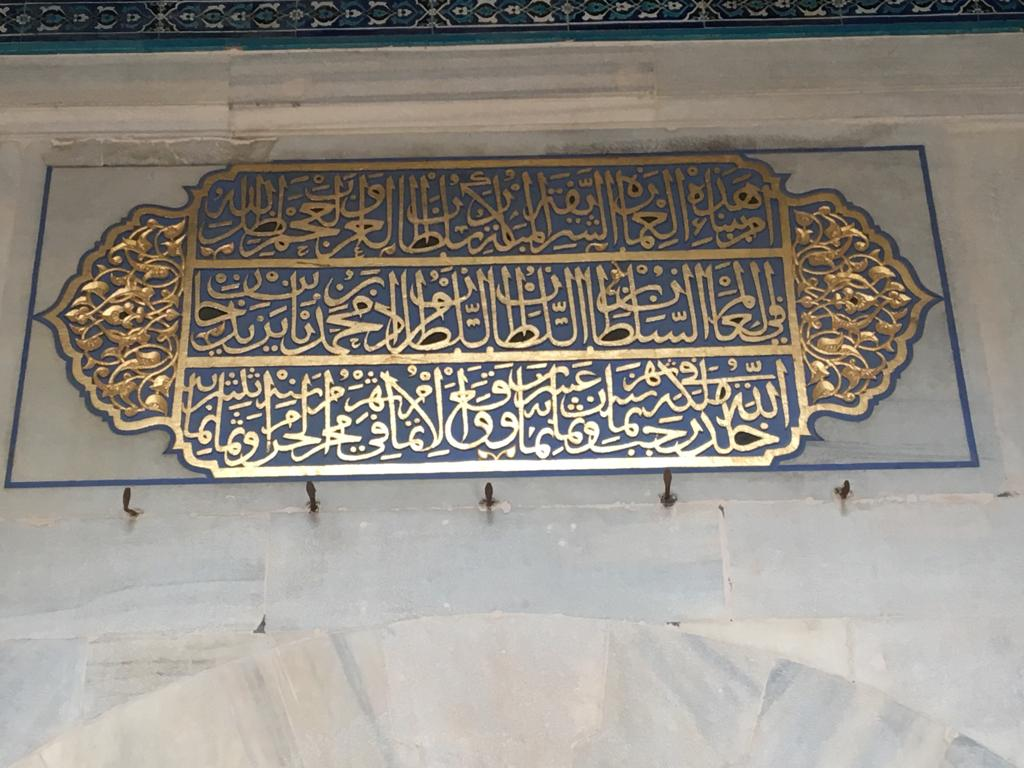 sülüs hat kitabe